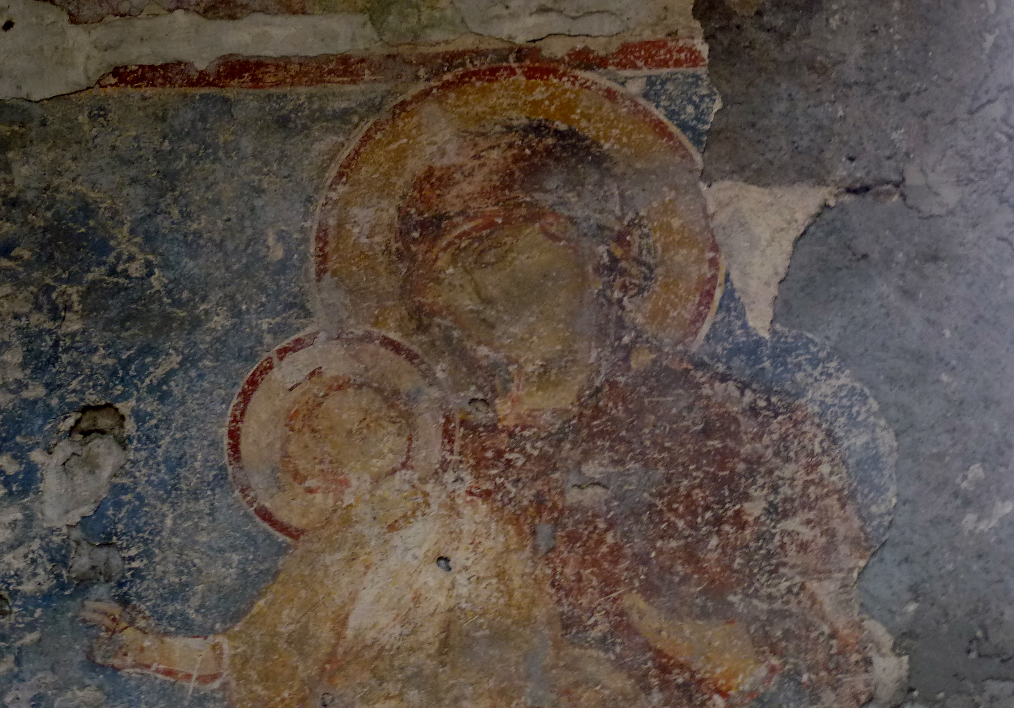 Fresko im Inneren der Kirche St. Anna in Trabzon